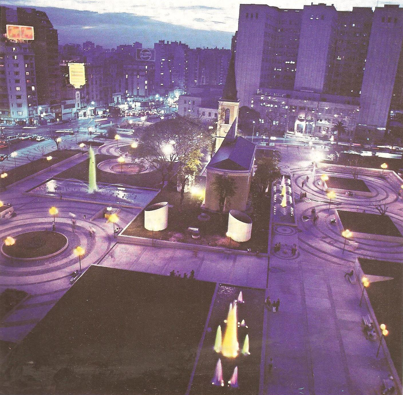 La entonces nueva Plaza Bernardo Houssay, construida en 1980 en donde antes se encontraba el viejo Hospital de Clínicas. Al fondo, el nuevo Hospital de Clínicas. Buenos Aires, Argentina.